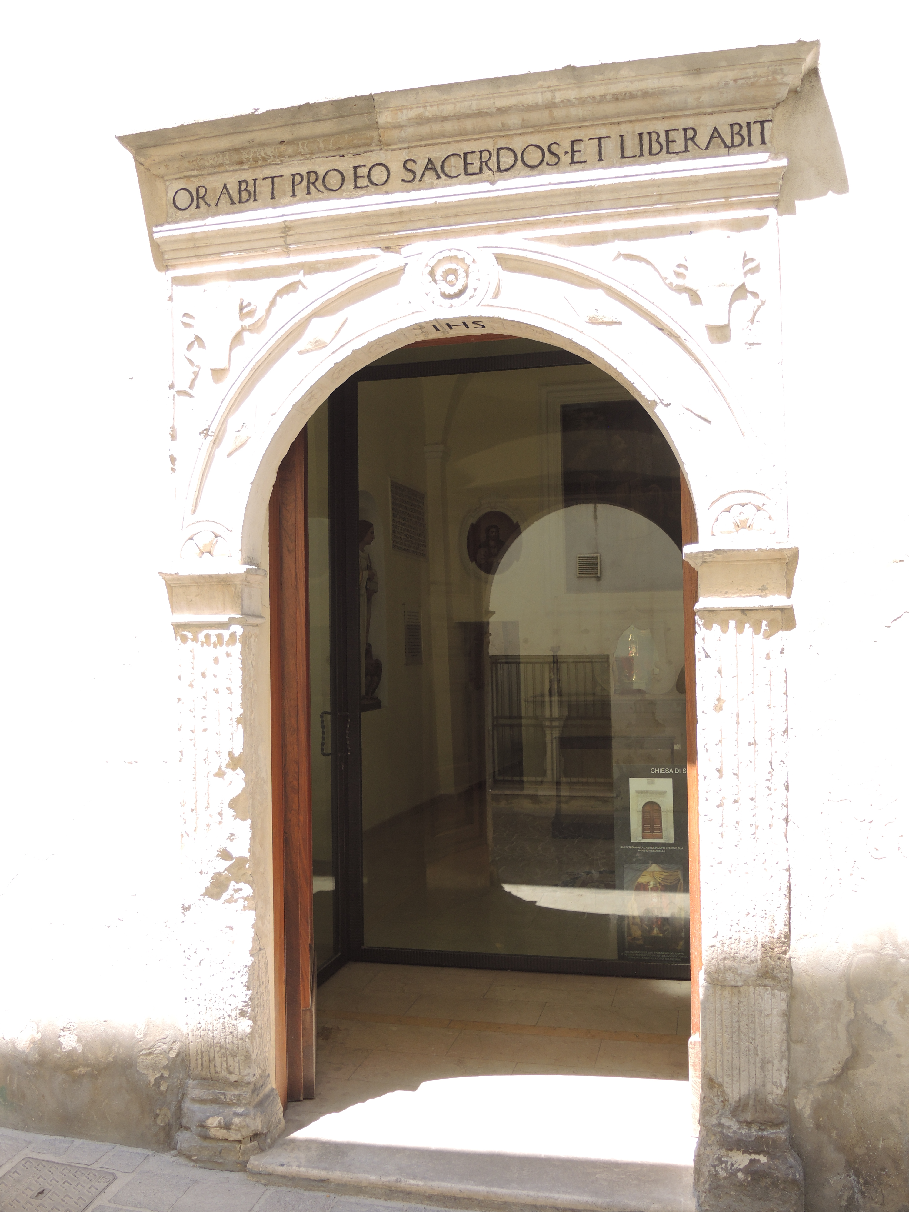 Lanciano - Chiesa di Santa Croce